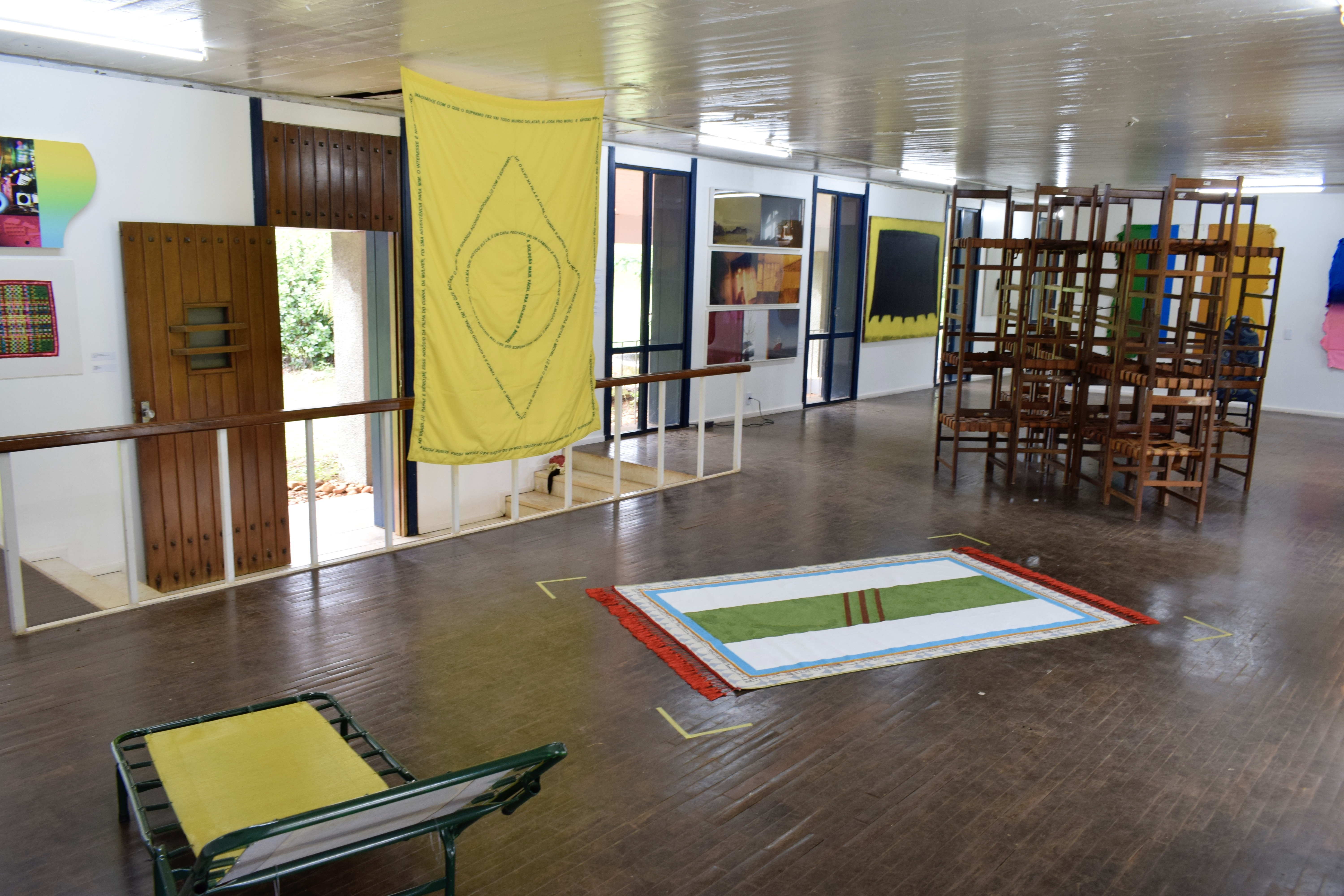 Sala da Casa Niemeyer durante a exposição "Triangular: Arte deste século". Foto: Victor Zaiden